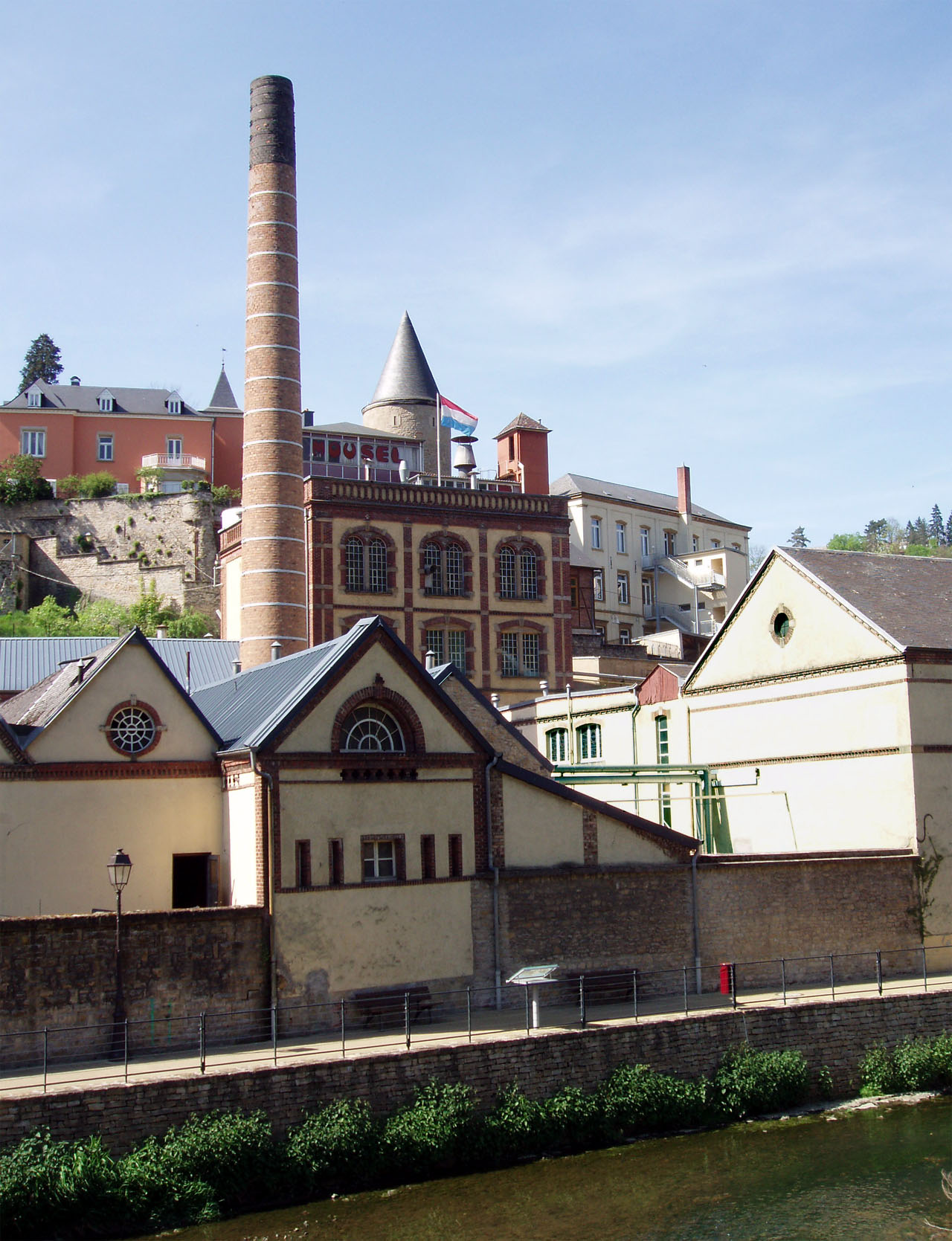 D'Gebai vun der Mouselsbrauerei a Clausen.